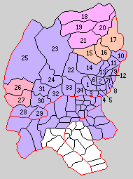 長野県上水内郡の町村。